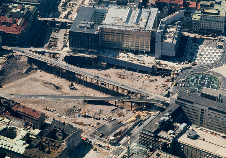 Riksdagshusbygget, Sergels torg och Brunkebergstorg. City. Rivningar. Motiv: Stockholms innerstad Nyckelord: Flygbilder, Riksintressen Kategori: Stadsmiljö Riksdagshusbygget, Sergels torg och Brunkebergstorg. City. Rivningar.